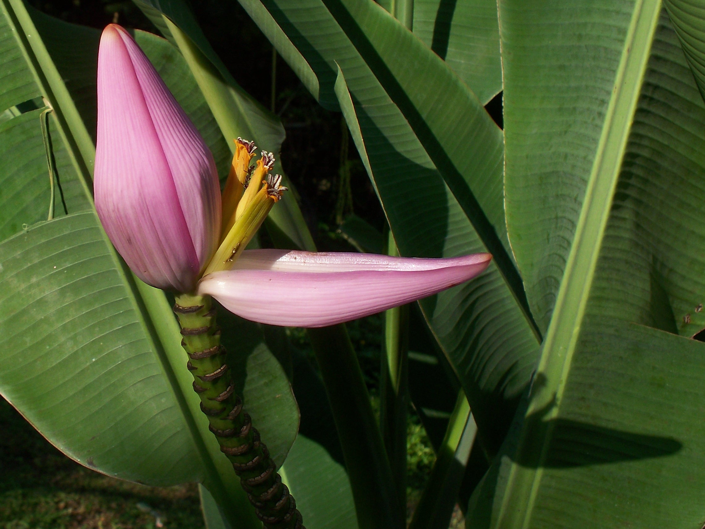 Flor de la planta de bananos (cambur) en las orillas del Parque Nacional Henri Pittier, Venezuela